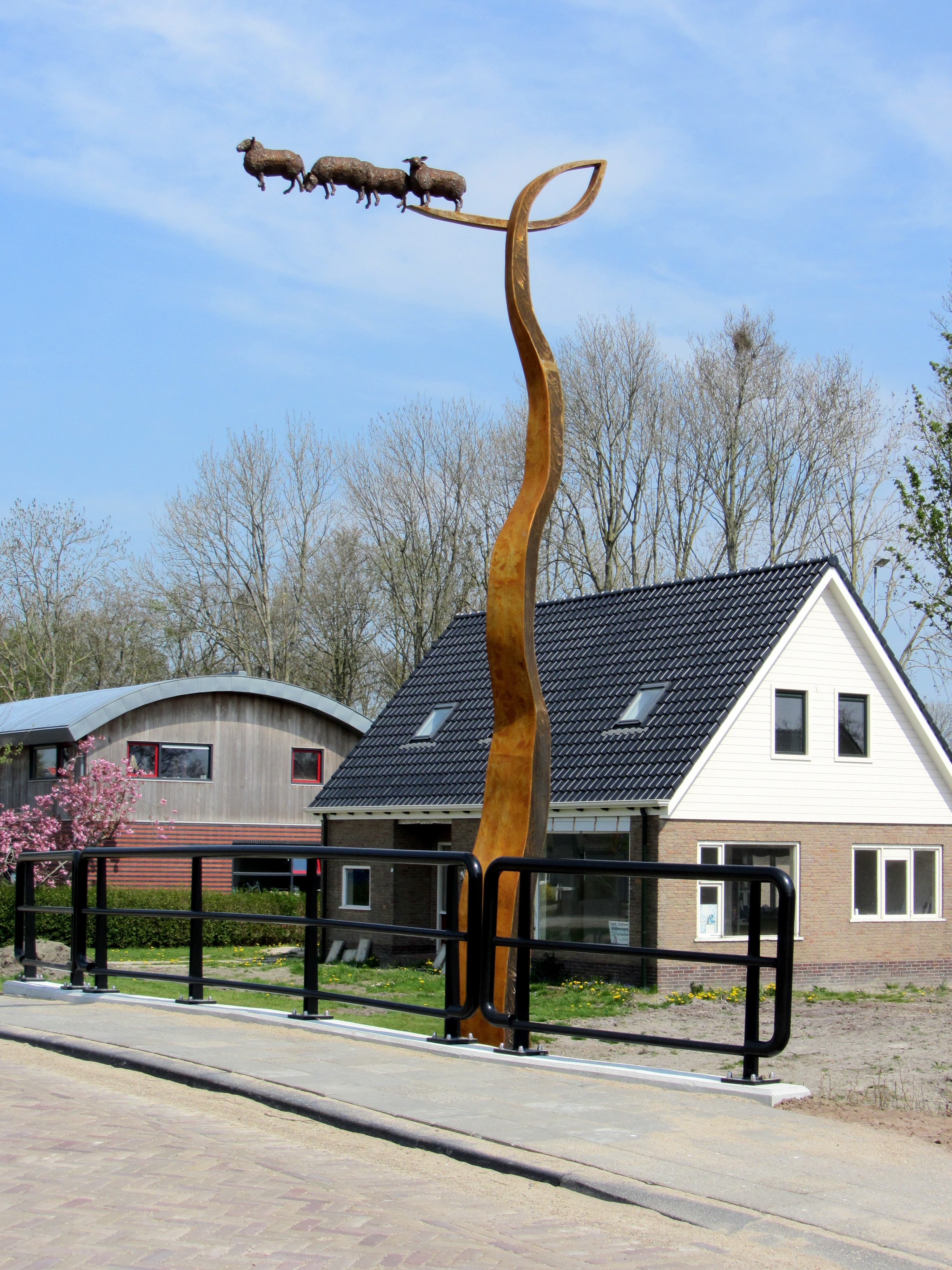 Kunstenaar: Hans Jouta, 2013